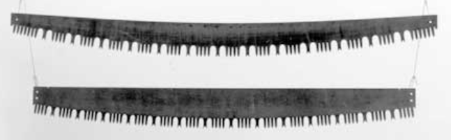 Stokksagbald; øvst for felling og nedst for kapping.